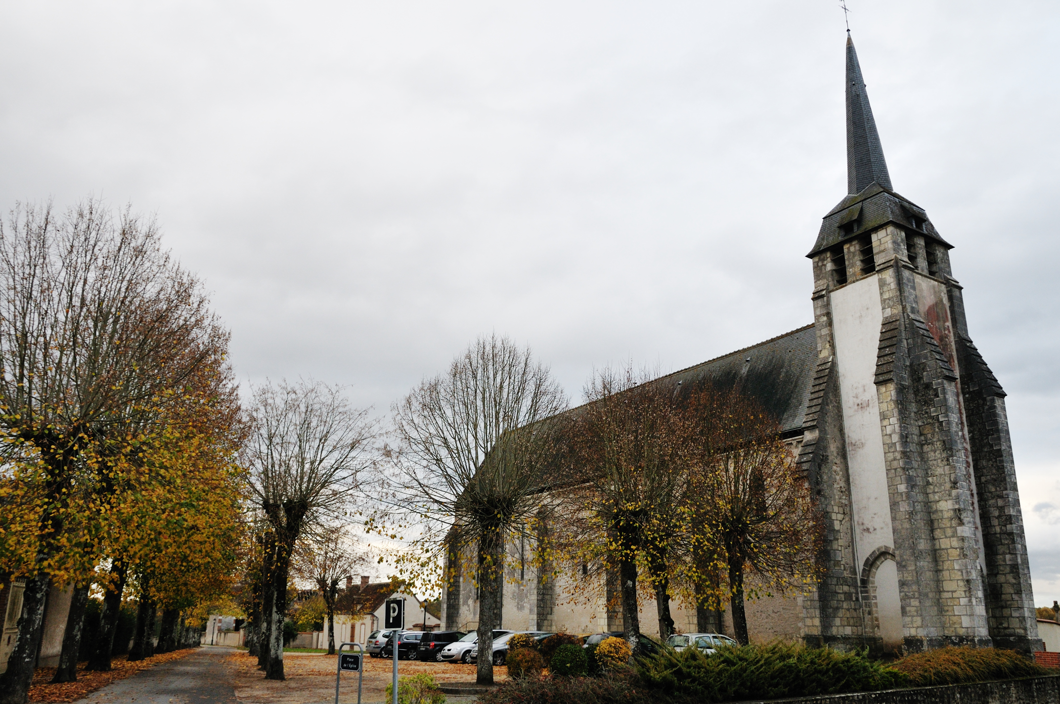 Église Saint-Euverte, Villeherviers, Loir-et-Cher, France